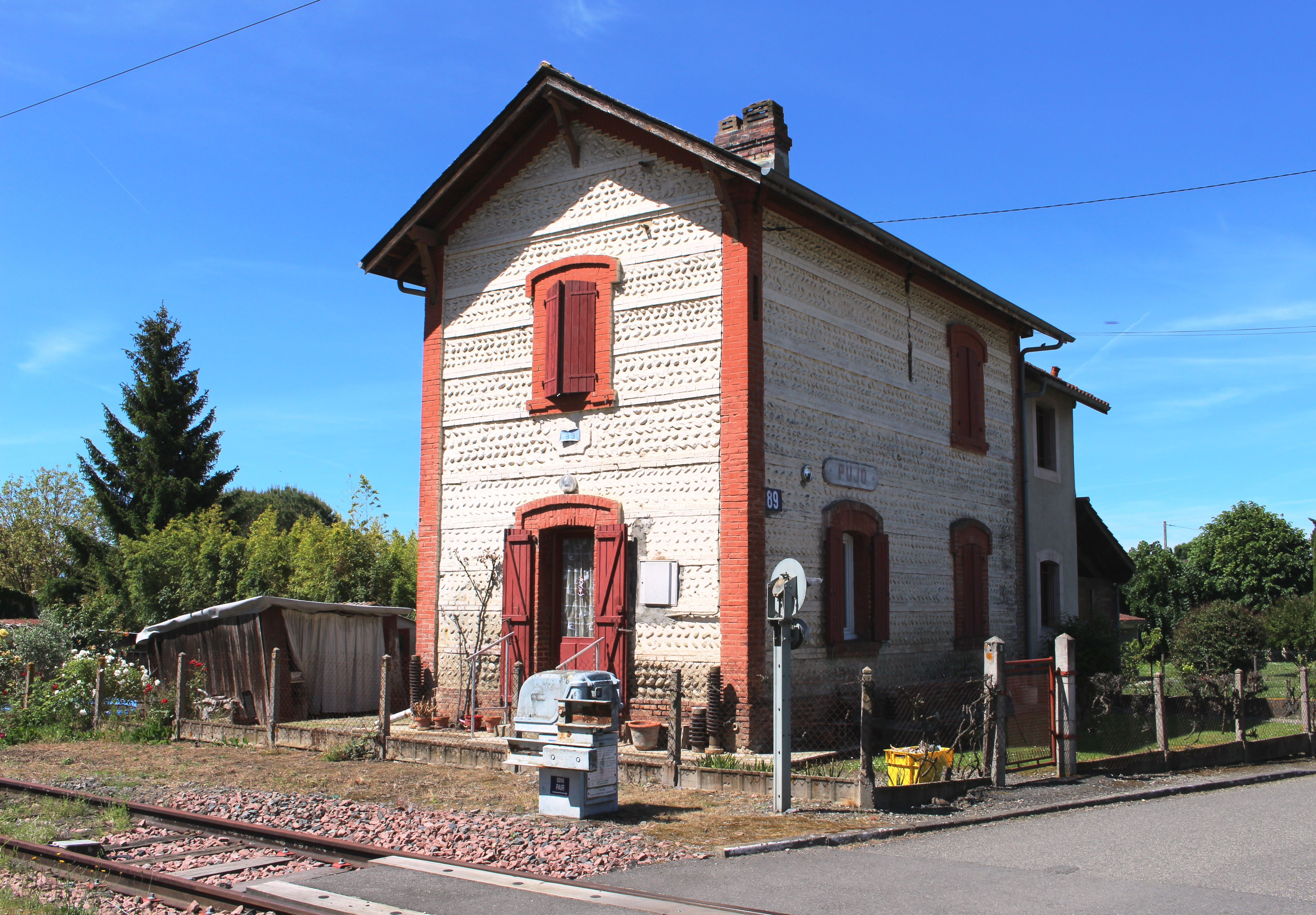 Passage à niveau de Pujo (Hautes-Pyrénées)